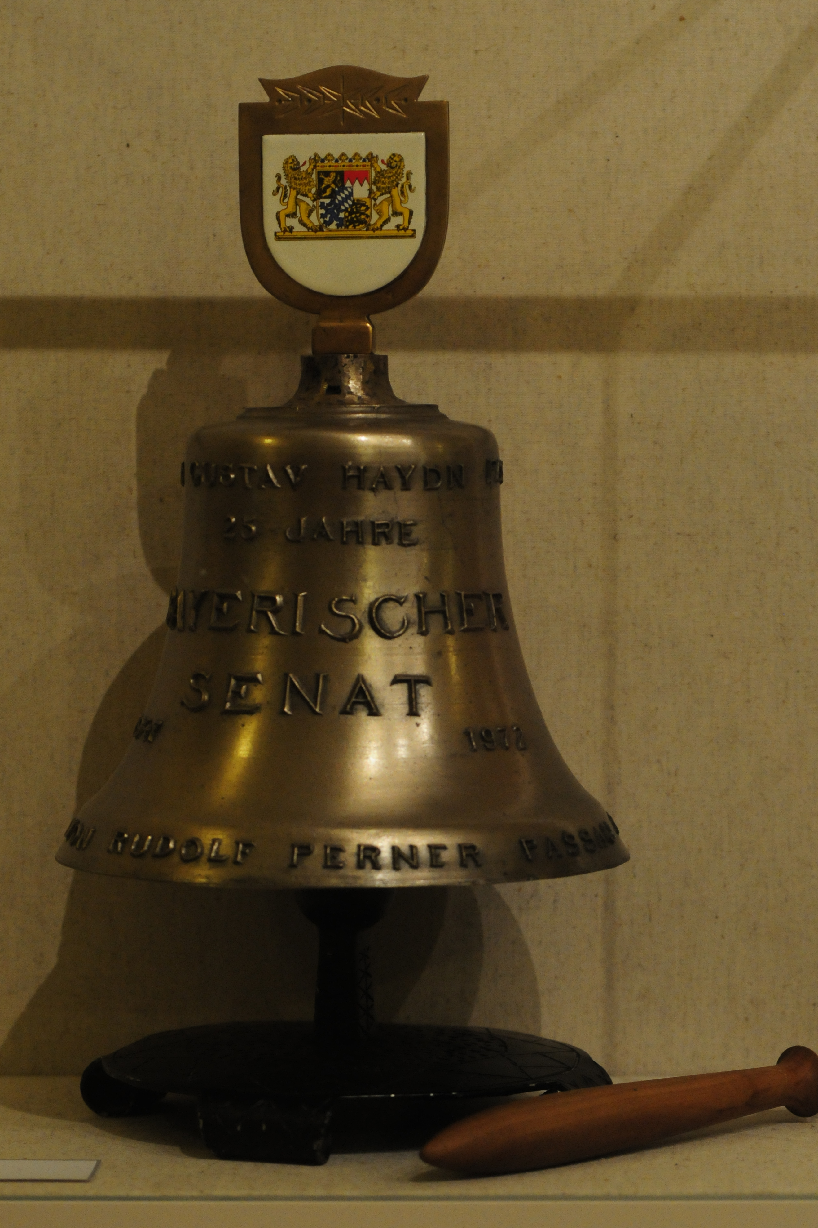 Landtagsprojekt Bayern The making of this work was supported by Wikimedia Austria. For other files made with the support of Wikimedia Austria, please see the category Supported by Wikimedia Österreich. Wikipedia im Landtag – Bayern 17. bis 19. Juli 2012 in MünchenDieses Foto wurde im Rahmen des Projektes „Wikipedia im Landtag“ erstellt.